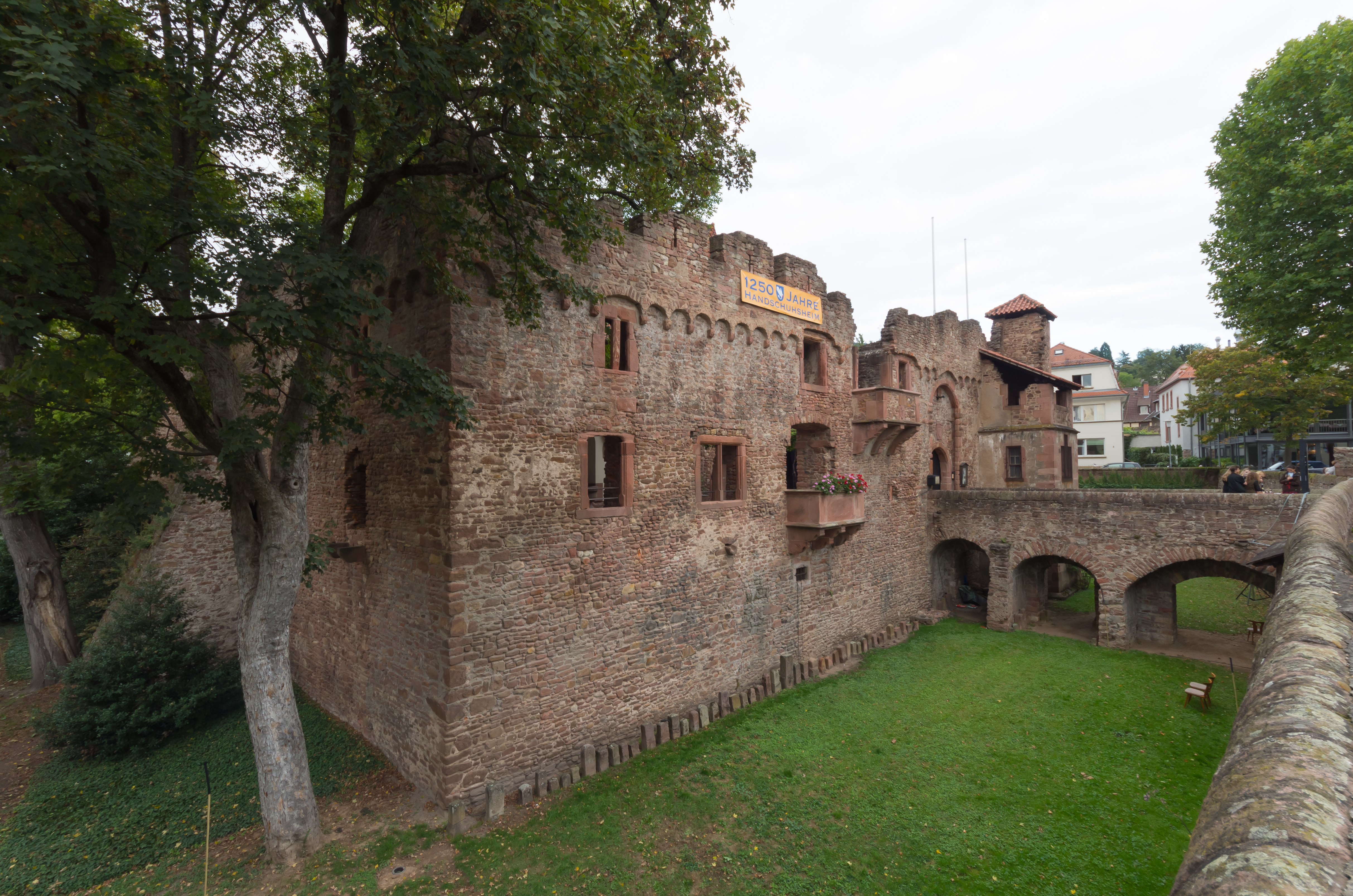 Tiefburg Handschuhsheim, die Ruine einer mittelalterlichen Wasserburg im Heidelberger Stadtteil Handschuhsheim im nordwestlichen Baden-Württemberg